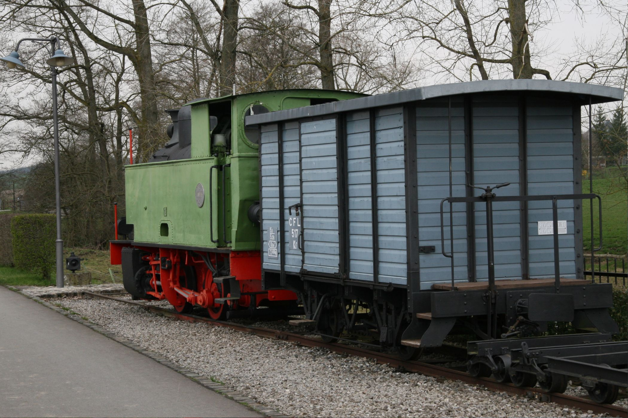 De Jangli op der Gare zu Nidderpallen.